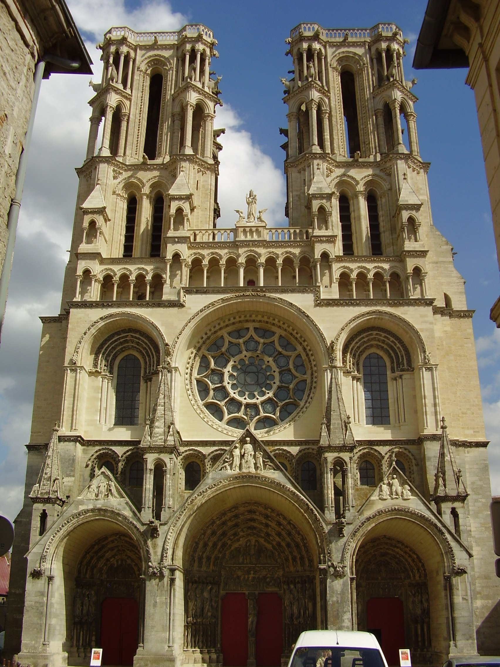 La Cathédrale Notre-Dame de Laon en juillet 2009.